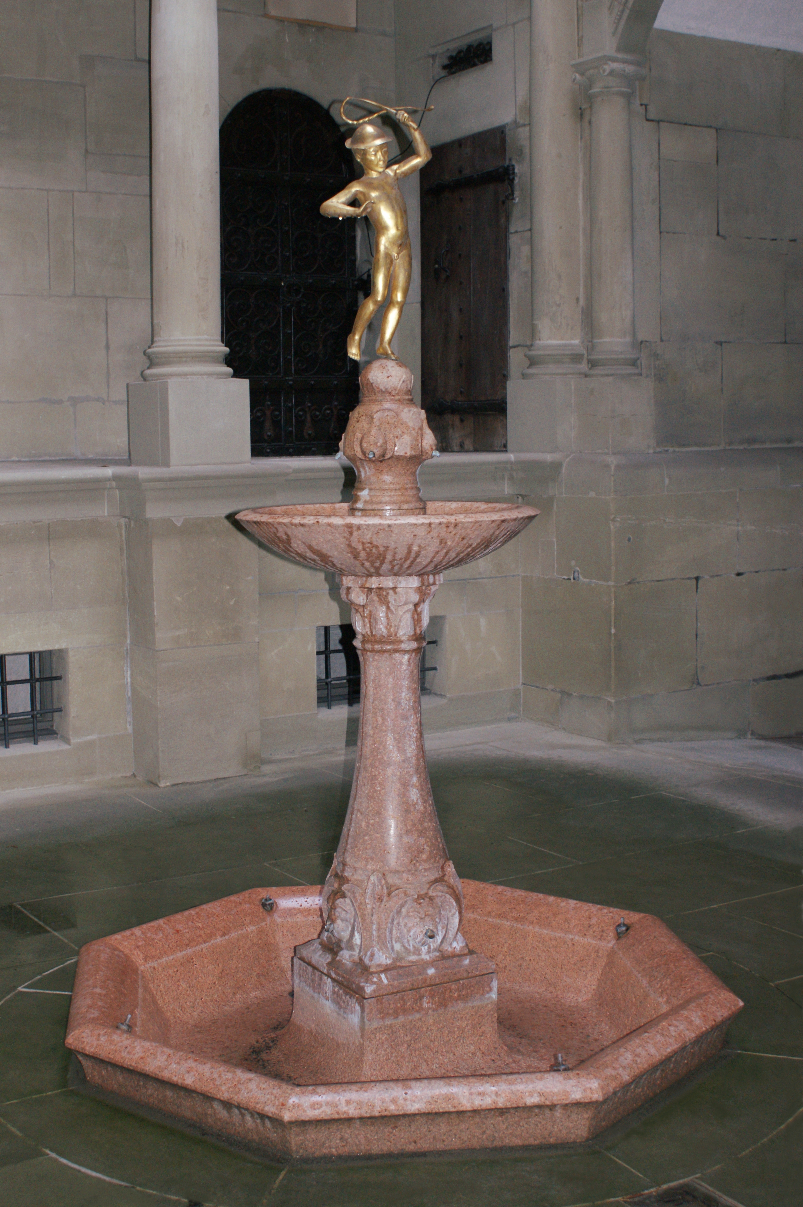 Rathaushofbrunnen